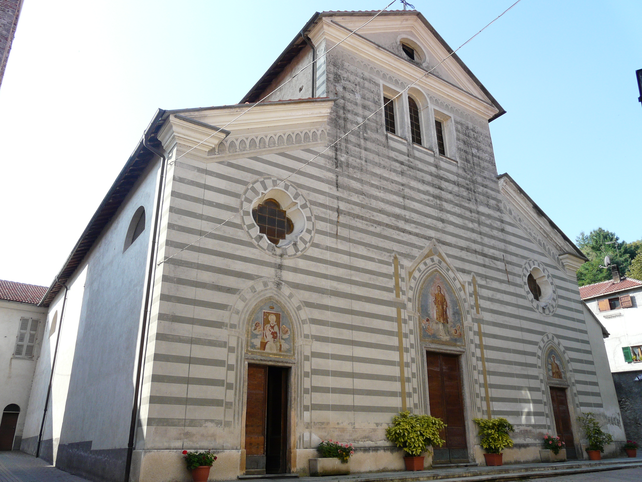 Chiesa di Santa Maria e San Lorenzo Calizzano, Liguria, Italia